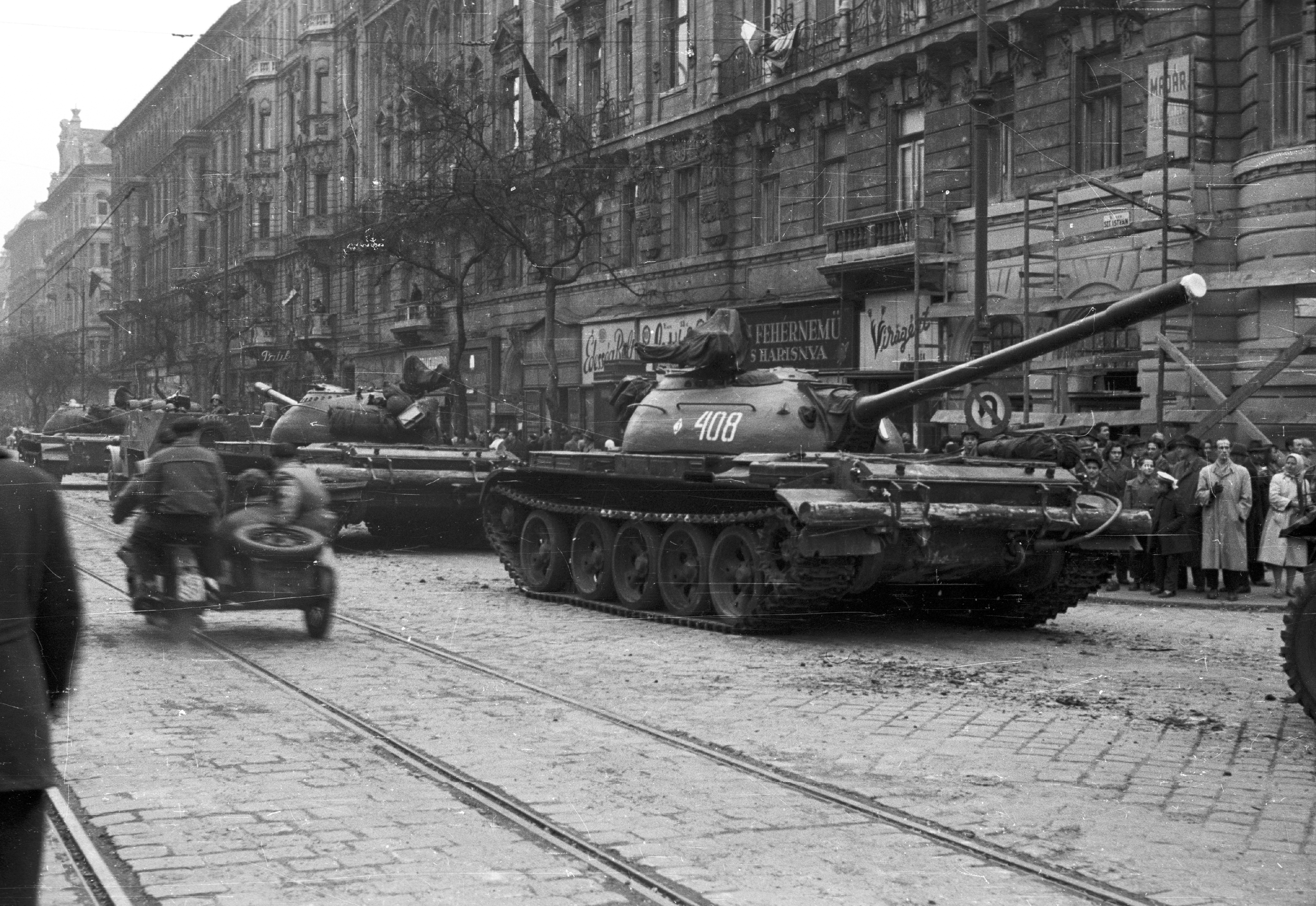 Szent István körút a Falk Miksa (Néphadsereg) utca felől a Honvéd utca felé nézve. A szovjet csapatok ideiglenes kivonulása 1956. október 31-én. Location: Hungary, Budapest V. Tags: revolution, street view, tank, motorcycle with sidecar, Soviet brand, sign-board, Budapest Title: Szent István körút a Falk Miksa (Néphadsereg) utca felől a Honvéd utca felé nézve. A szovjet csapatok ideiglenes kivonulása 1956. október 31-én.